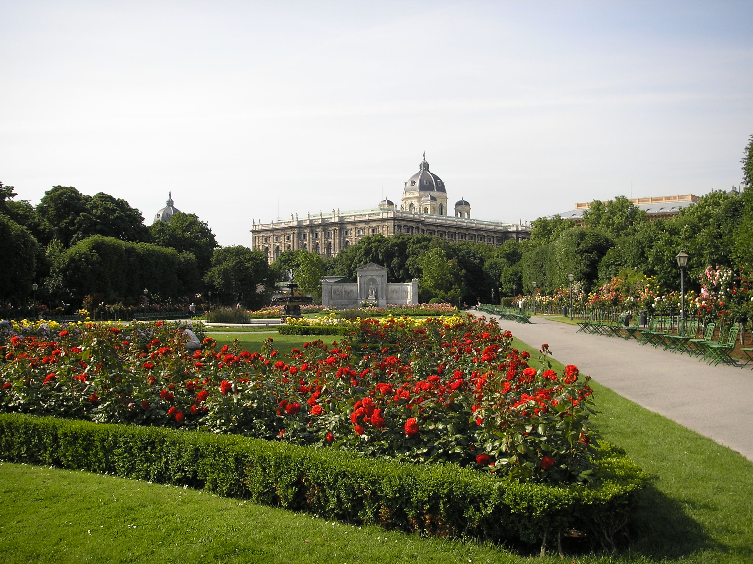 View of Volksgarten in Vienna.